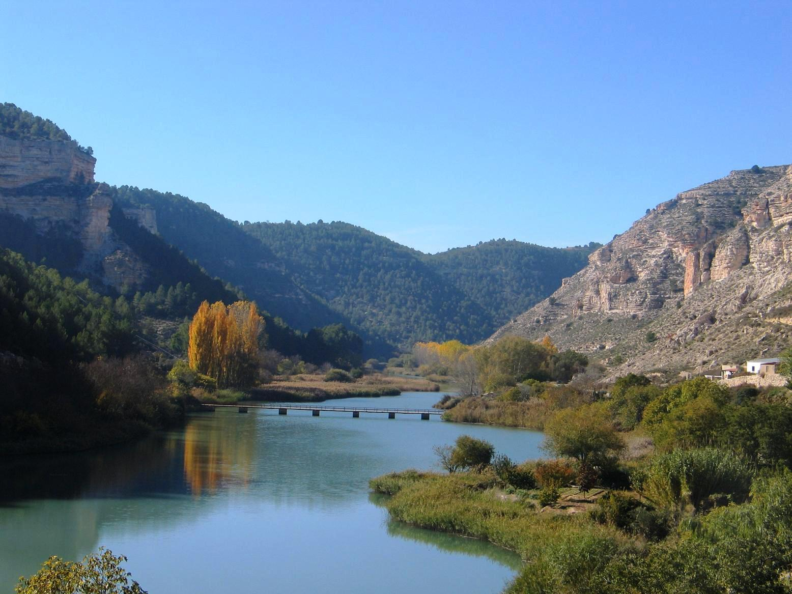 Tolosa, pedanía de Alcalá del Júcar. Vistas desde Río Tranquilo.